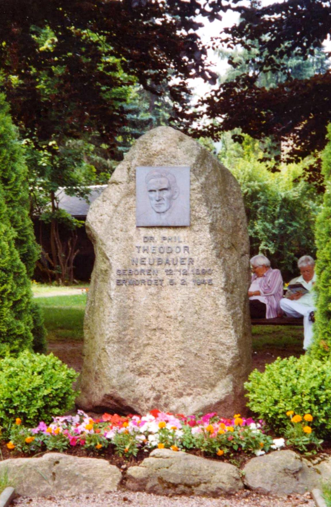 Grabstätte und Grabstein für Dr.-Theodor-Neubauer im gleichnamigen Park von Tabarz